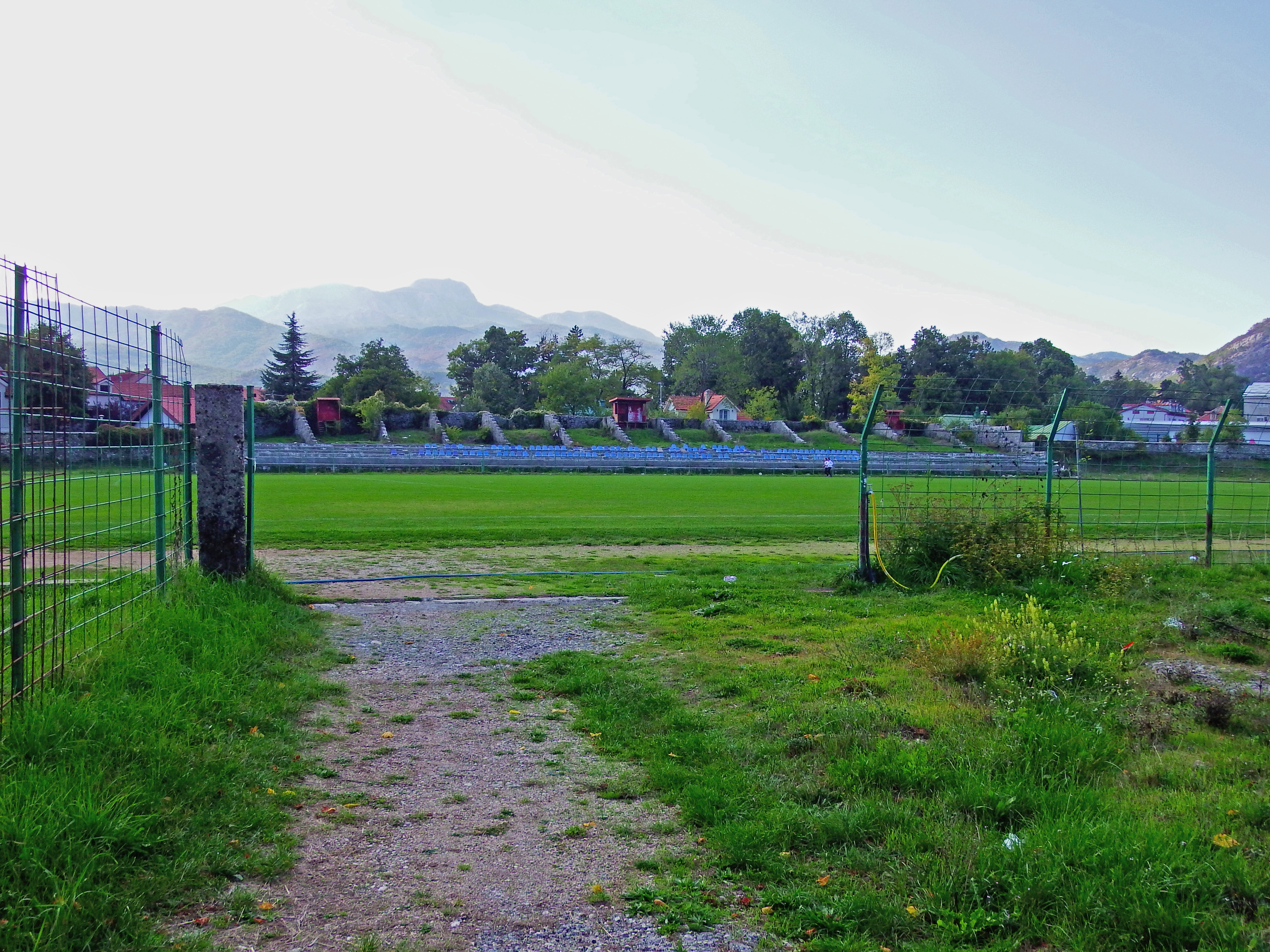 Stadion Obilića Poljana w Cetyni, w Czarnogórze Stadion Obilića Poljana in Cetinje in Montenegro